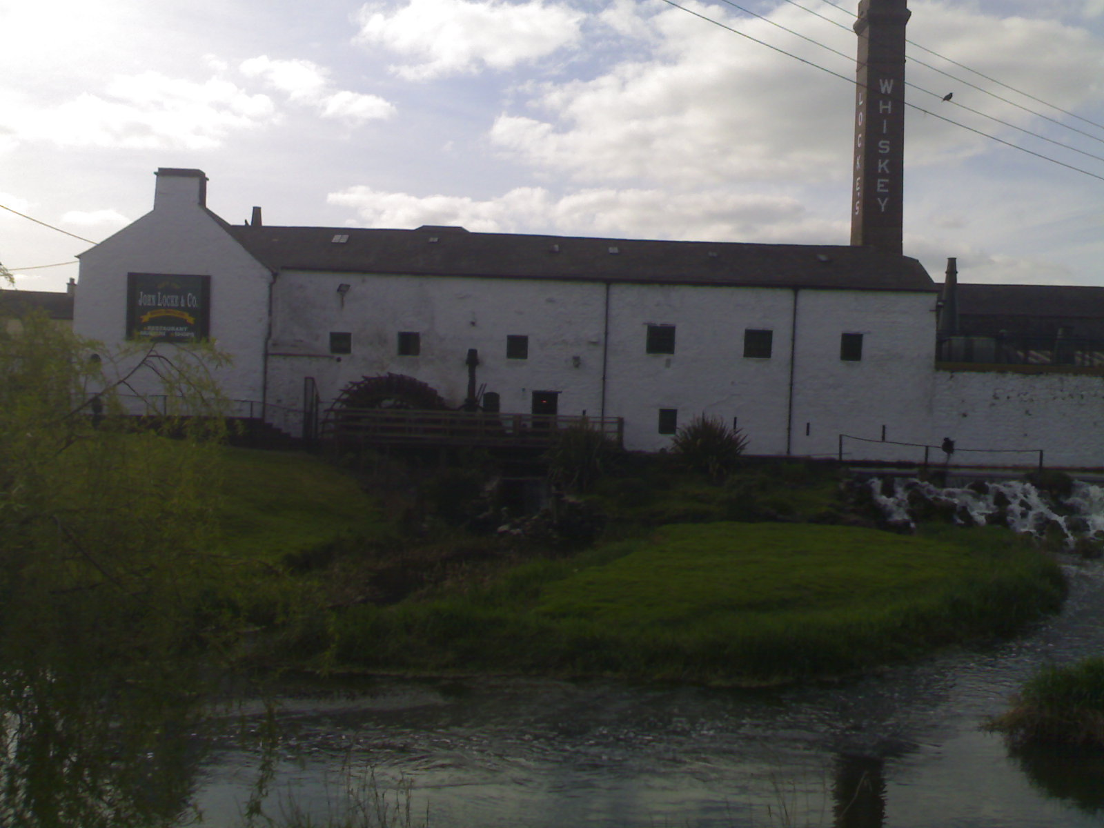 Lockes, Kilbeggan, Bronsa Distillery